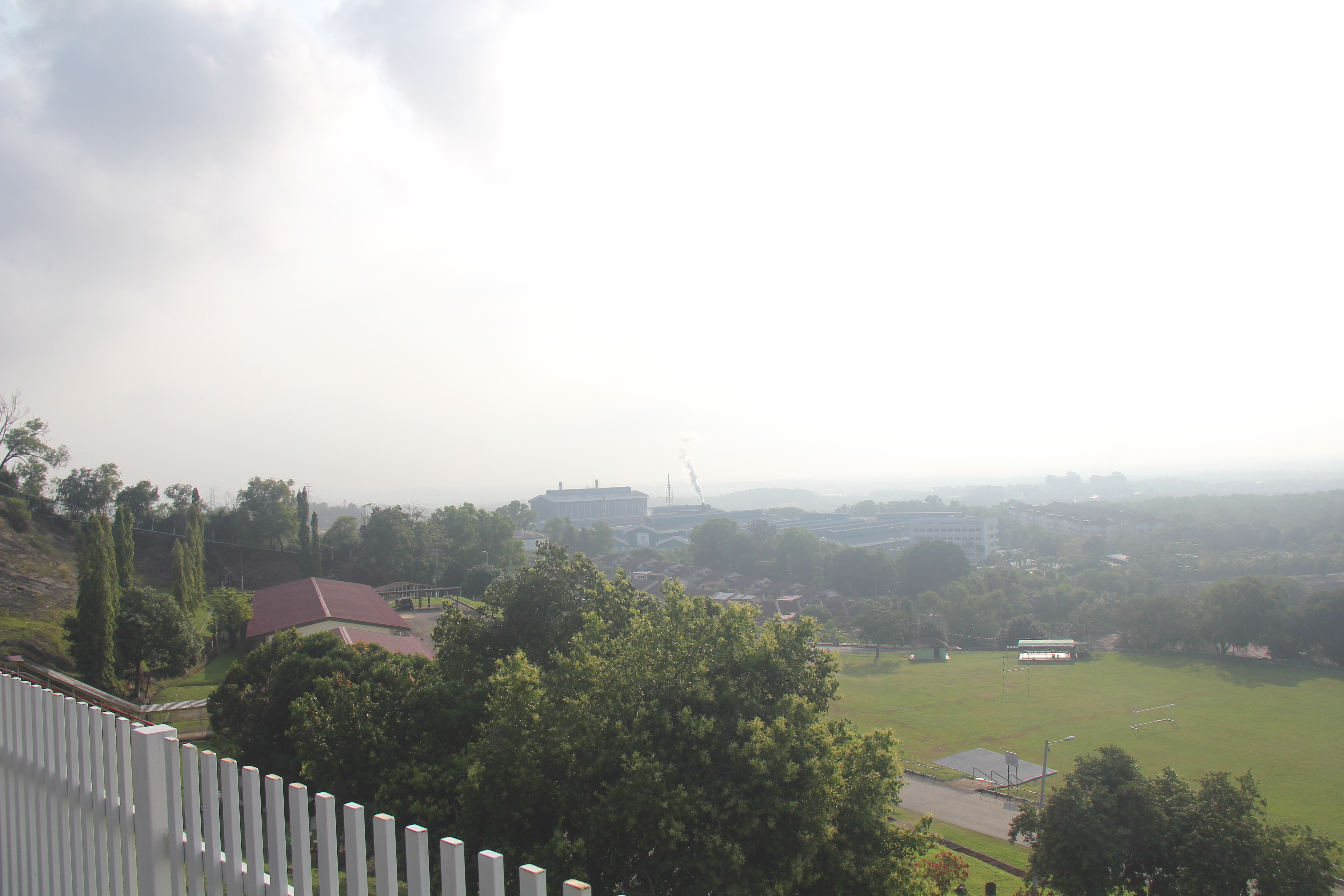 Copyright Protected Taken by Syaddad Nabil Shamsullah Victorious 1317